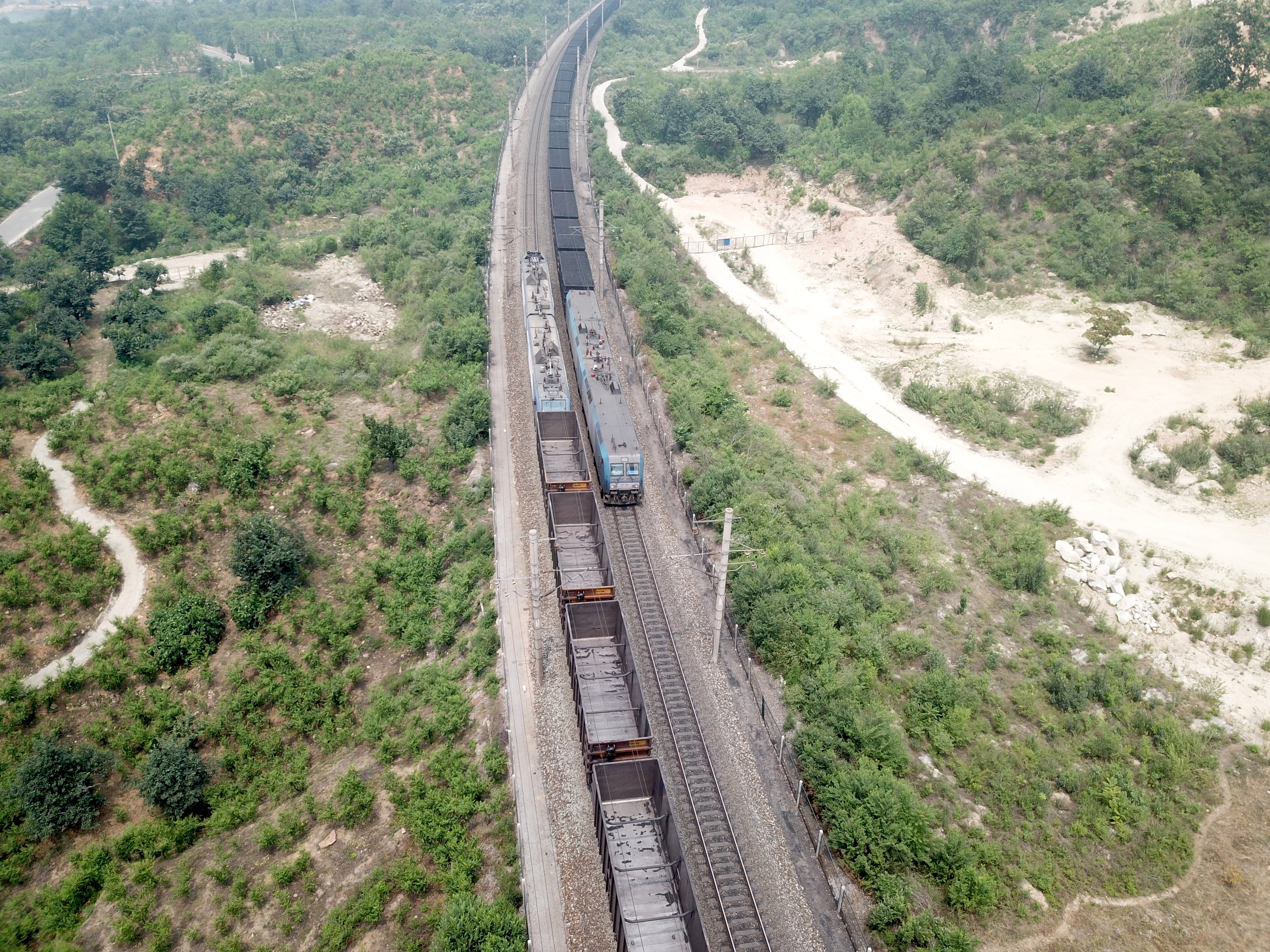 中文（中国大陆）: 大秦铁路下莊站附近